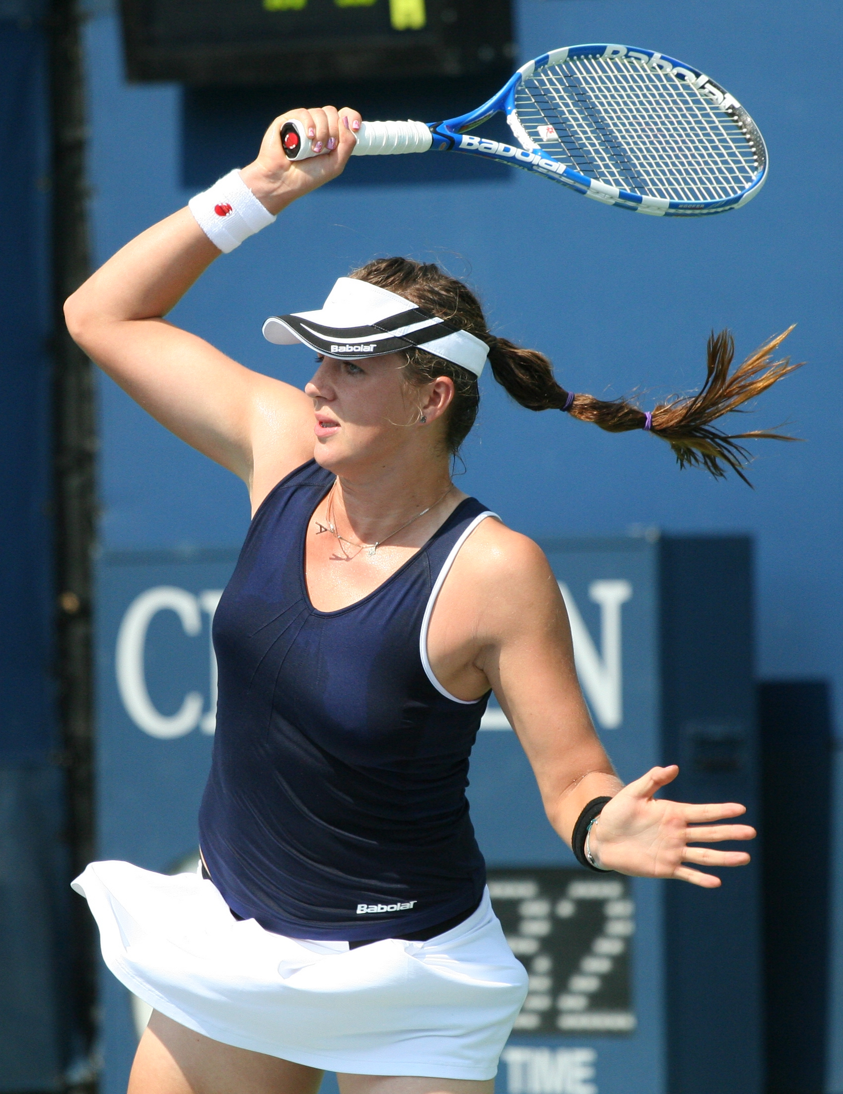 U.S. Open Sept. 1, 2010